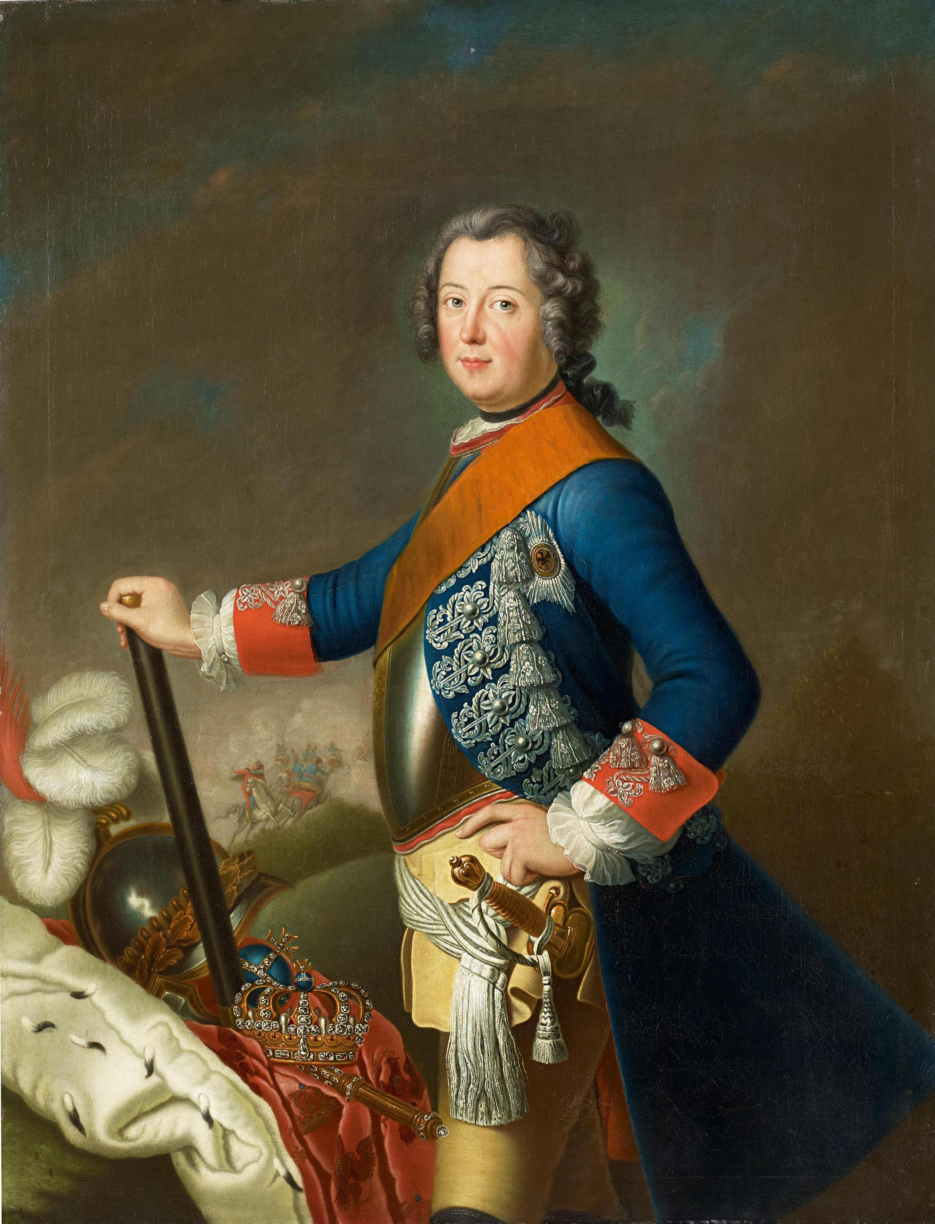 Friedrich II von Preußen als junger Heerführer